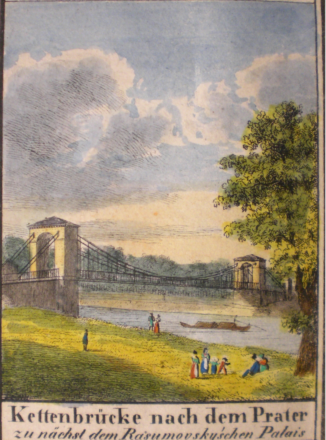 Kettenbrücke beim Palais Rasumofsky (heute Rotundenbrücke) in einer Randvignette des Plans von Wien-Landstraße von Carl Graf Vasquez (ca. 1835)